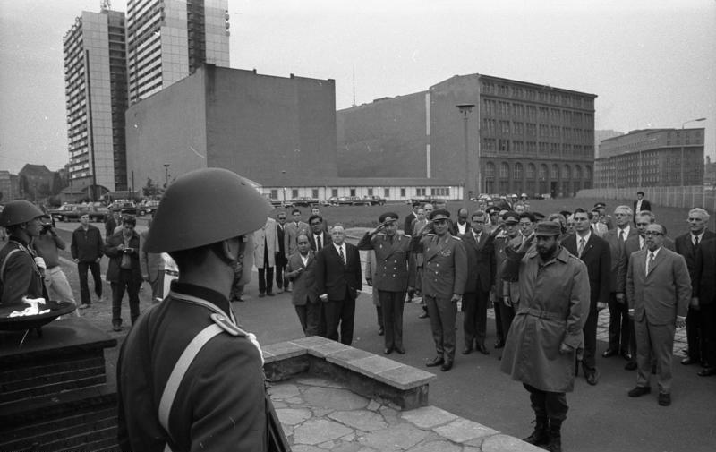 ADN-ZB/Koard 14.6.72 Berlin: Castro Der Erste Sekretär der KP Kubas und Ministerpräsident der Revolutionären Regierung der Republik Kuba, Fidel Castro (vorn), legt am 14.6.27 an der Reinhold-Huhn-Gedenkstätte einen Kranz nieder und verharrte in schweigendem Gedenken. Er wurde von Werner Lamberz, Mitglied des Politbüros und Sekretär des ZK der SED (1.E., 2.v.), Generalleutnant Art[h]ur Kunath, Stadtkommandant von Berlin (1.R., 4.v.l.), Erich Mielke, Kandidat des Politbüros der ZK der SED und Minister für Staatssicherheit (3.v.l.), Carlos Rafael Rodriguez, Mitglied des Sekretariats des ZK der KPK und Minister der Revolutionären Regierung (1.R.,r.), und weiteren Persönlichkeiten begleitet.